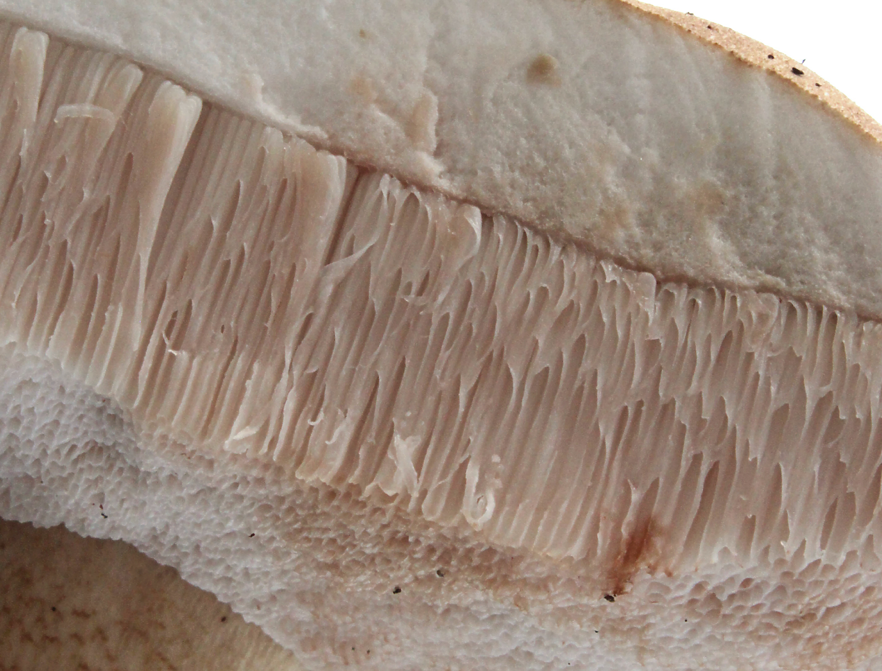 Tylopilus felleus (Bull.) P. Karst.